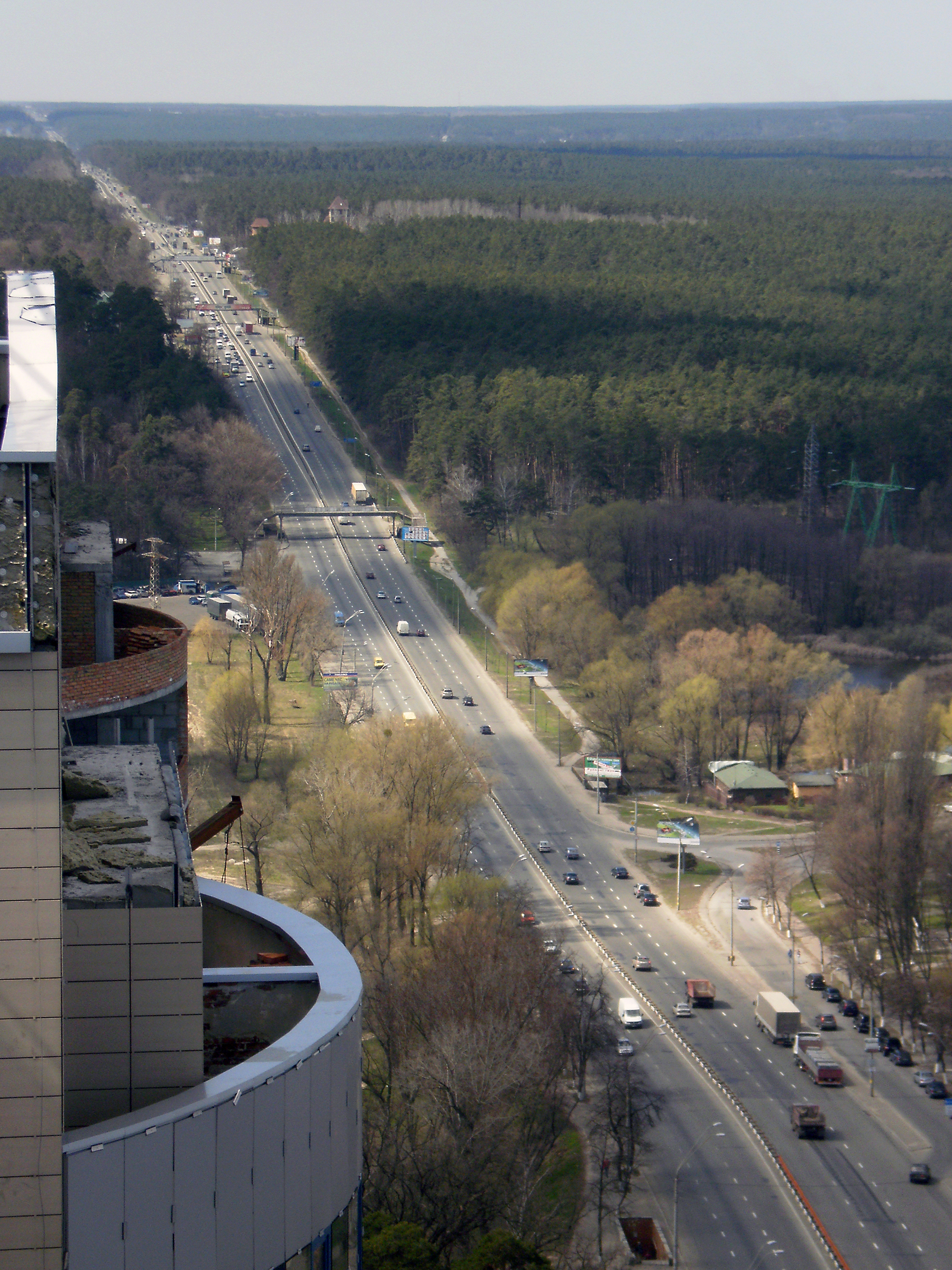 в Киеве